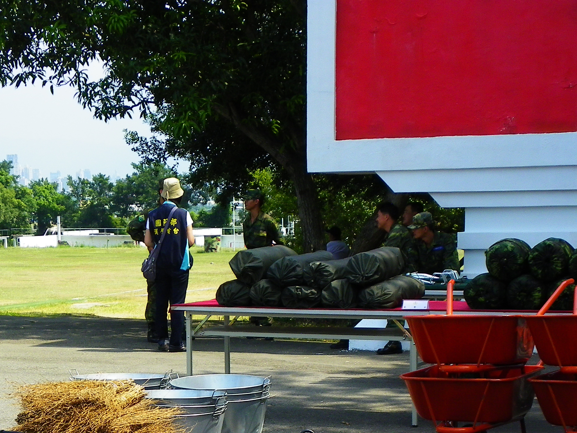 2012年成功嶺營區開放活動，漢聲電台記者採訪支援展示的官兵。